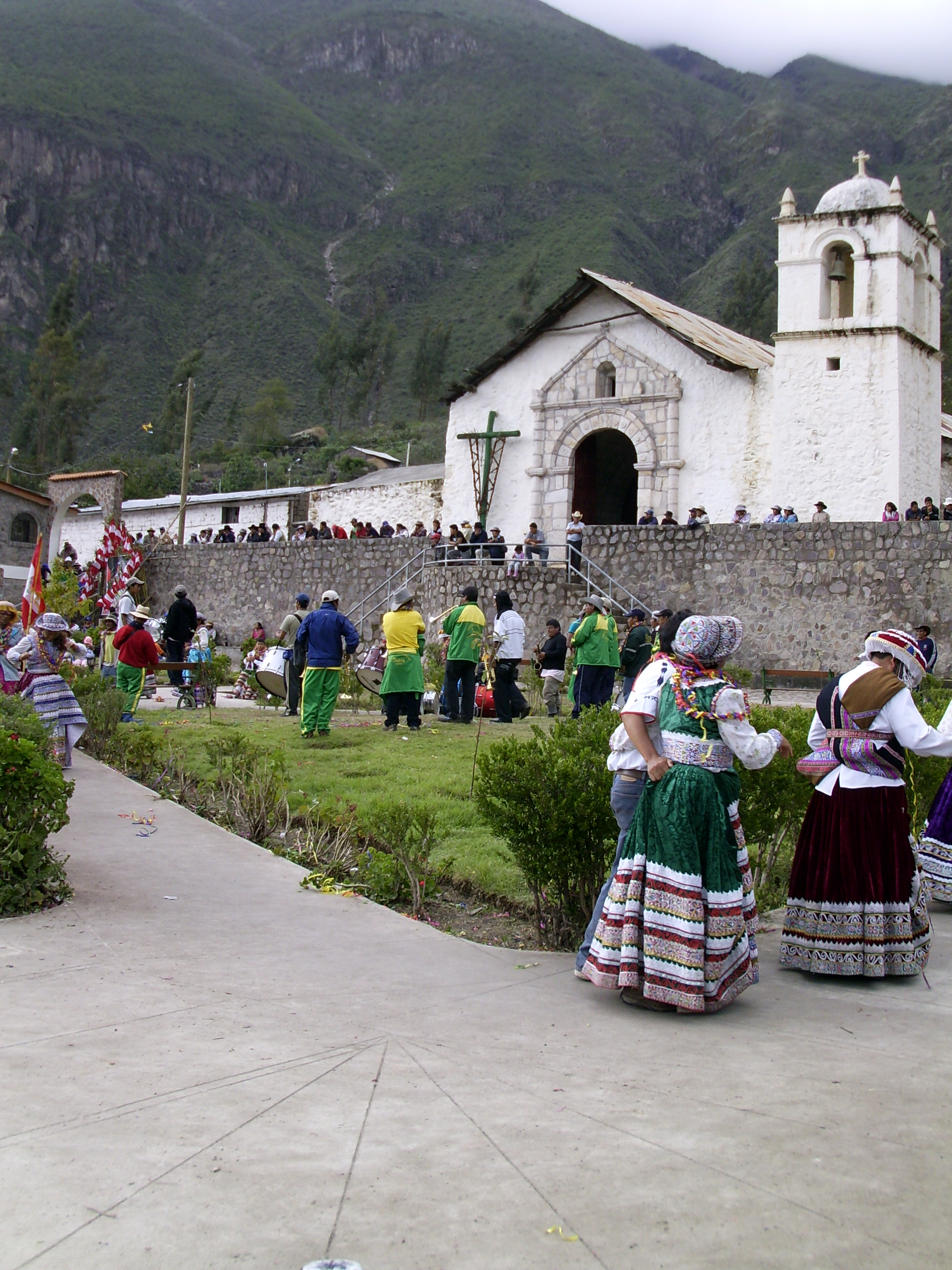 Placita de Tapay.